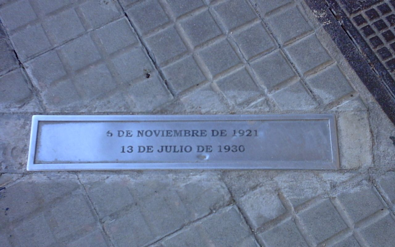 Inscripición en recuerdo de este estadio, en la acera de Montevideo